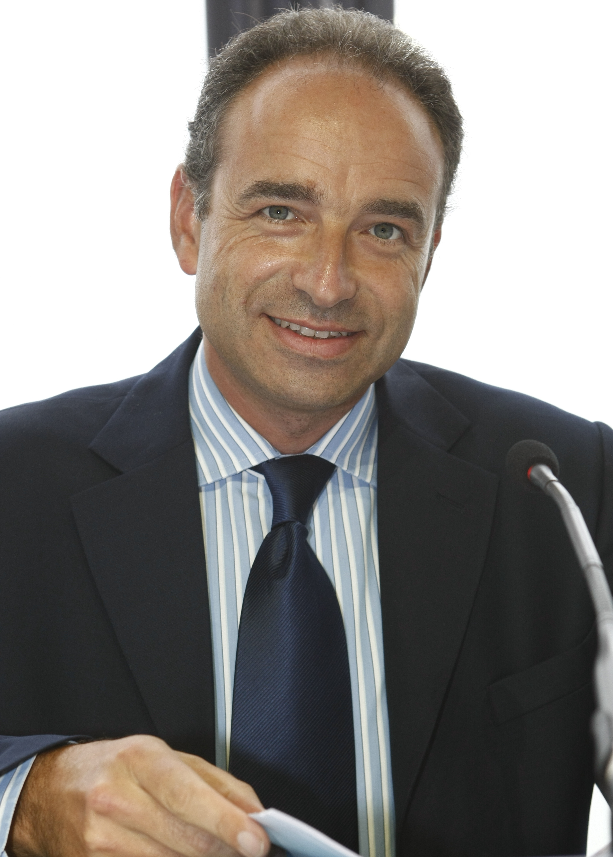 Jean-François Copé, French politician